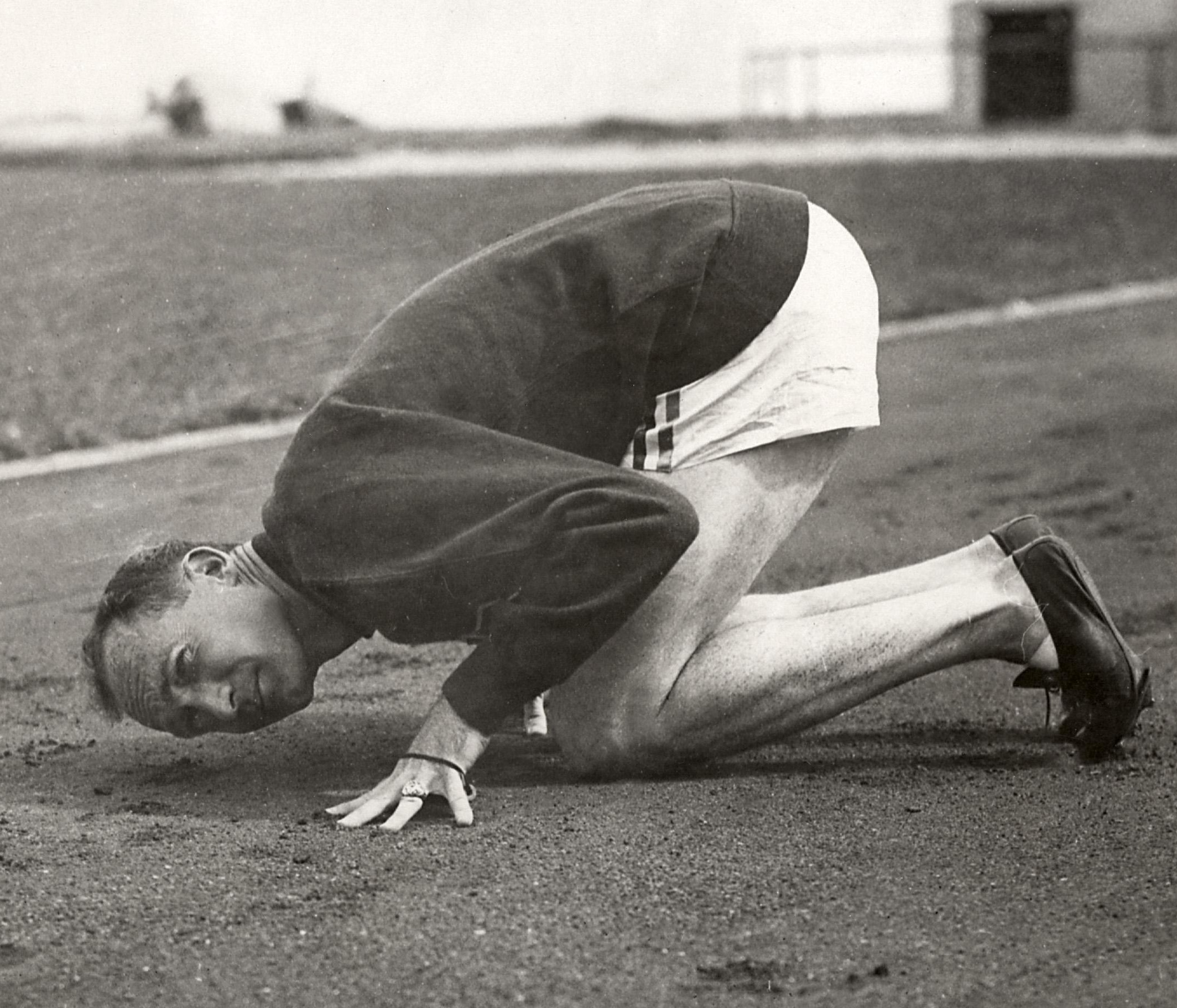 Sport. Olympische Spelen 1928 Amsterdam, Nederland : De Amerikaan Jackson Scholz, kanshebber op de 200 meter hardlopen, inspecteert de baan.